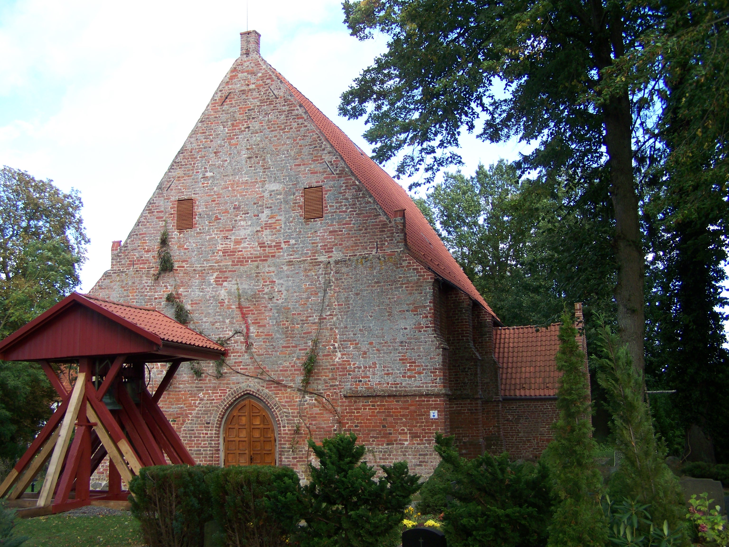 Kirche in Weitenhagen, Vorpommern.